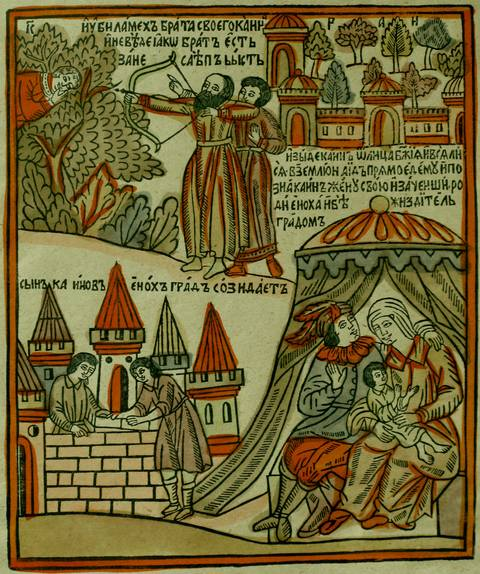 "БИБЛИЯ ДЛЯ БЕДНЫХ" (1692-1696 гг.) ВАСИЛИЯ КОРЕНЯ.